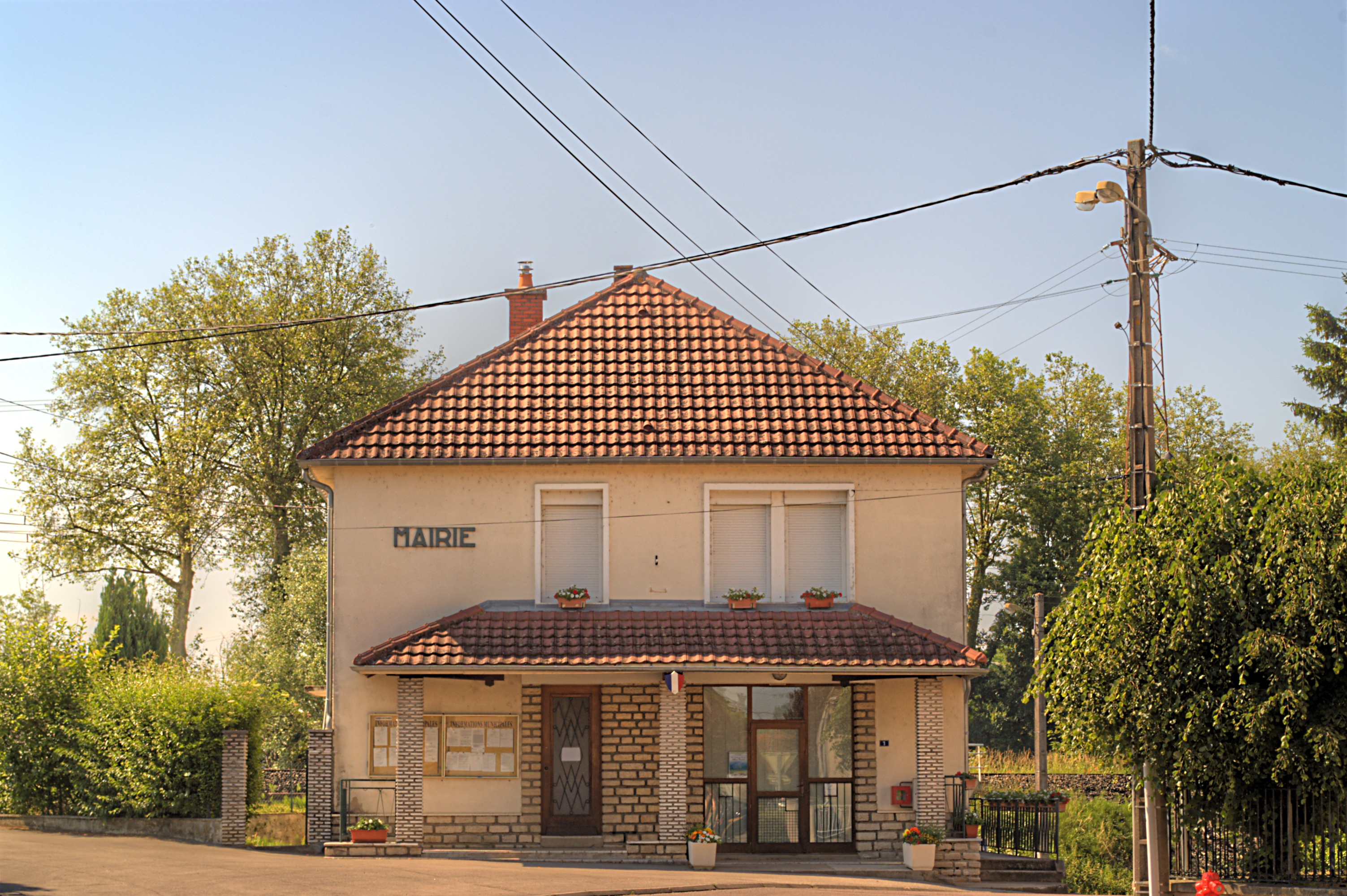 Mairie, rue Anne-Marie Javouhey, Jallanges (Côte d'Or, Bourgogne, France)